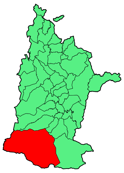 Larraine udalerriaren kokapena zuberoan